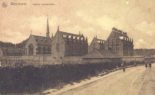 Landbouwschool Sint-Joseph of Godtschalck - Vierstraat - Wijtschate - Heuvelland - West-Vlaanderen - Vlaanderen - België